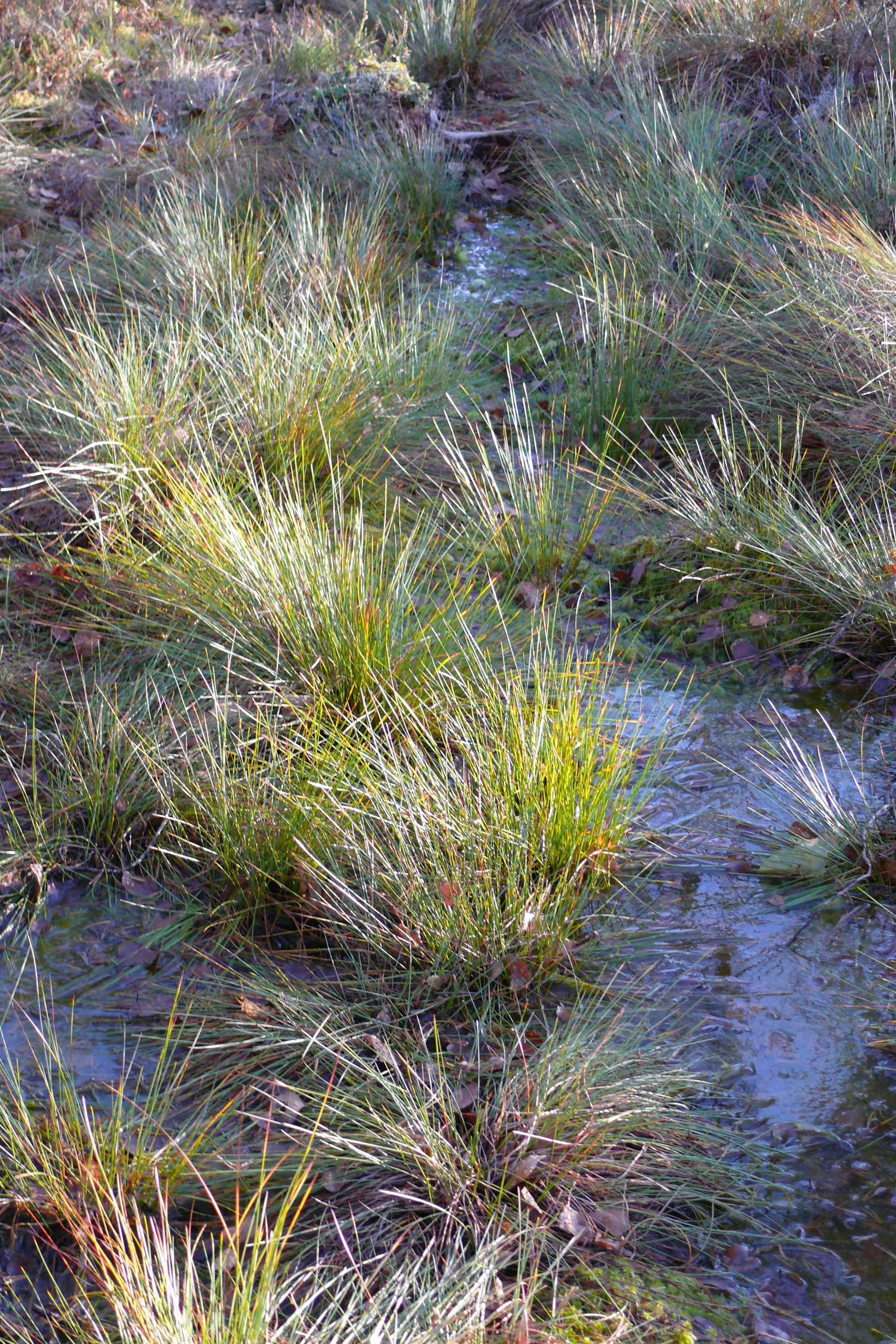 Tarnamättad Väätsa rabas.